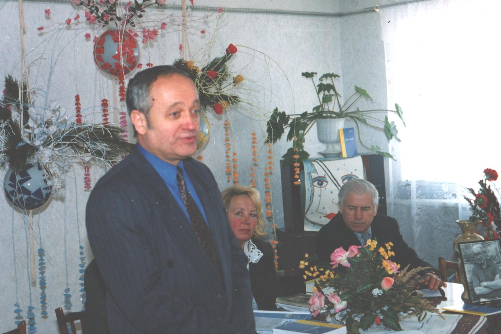 Фото